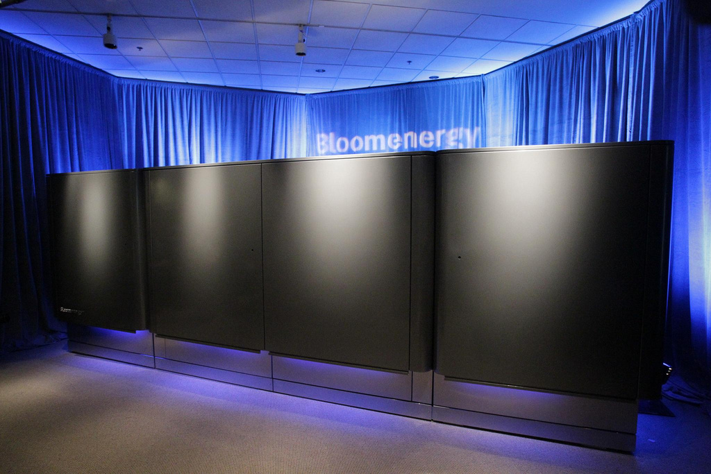 Bloom Energy Servers